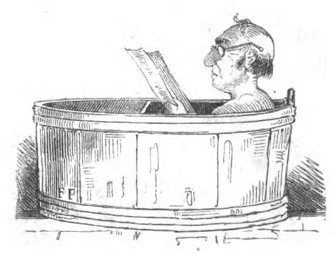 Fliegende Blätter, Volume 1, image on page 62